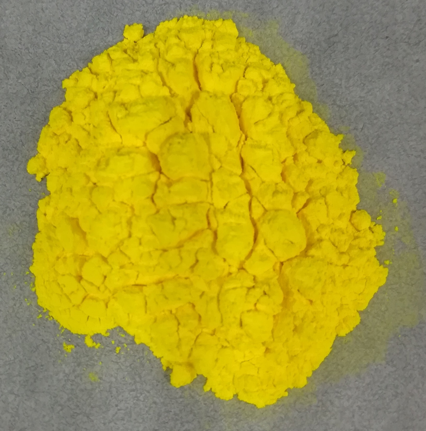 钨酸，99%，H2WO4